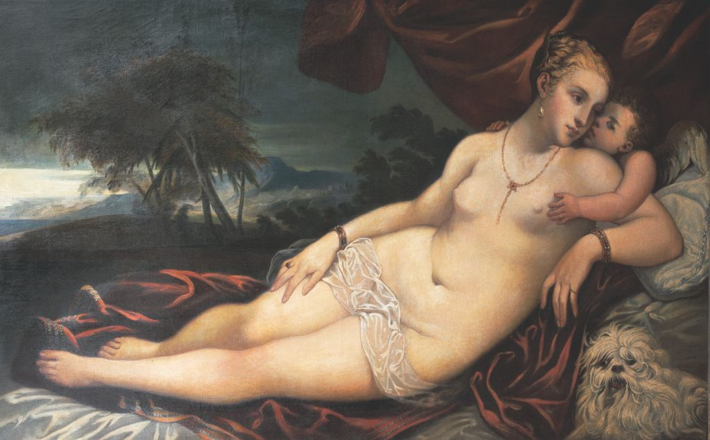 after Tiziano